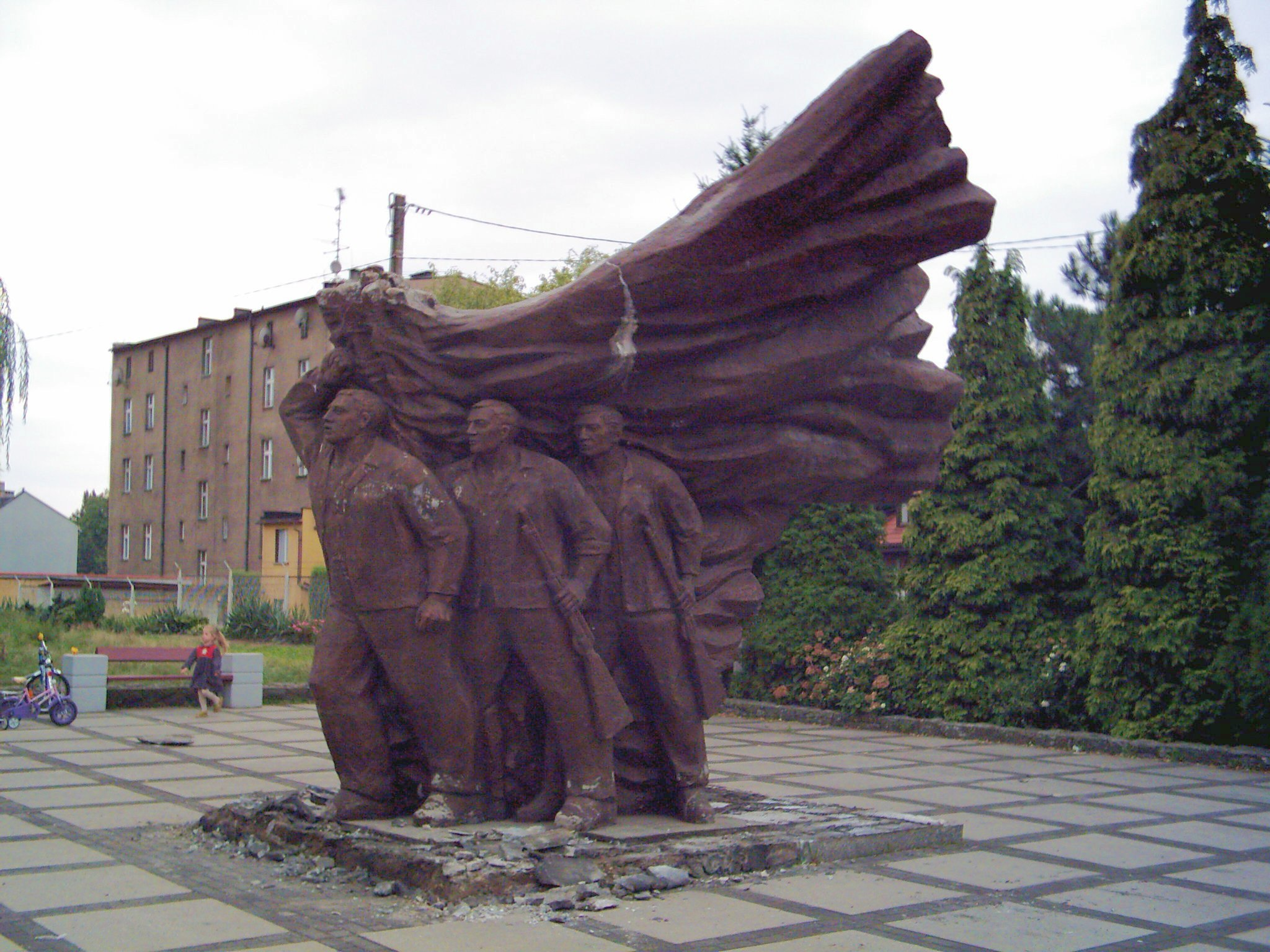 Wodzisław Śląski - Pomnik Powstańców Śląskich.